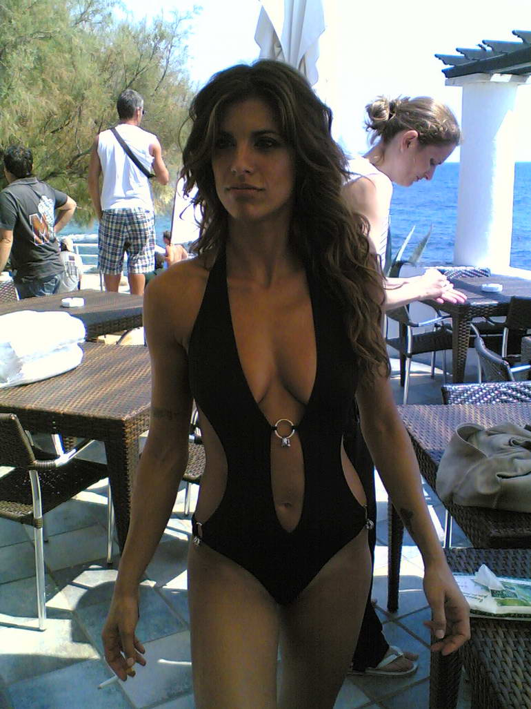 Giorgio Avveduto, foto fatta a Capalbio con cellulare